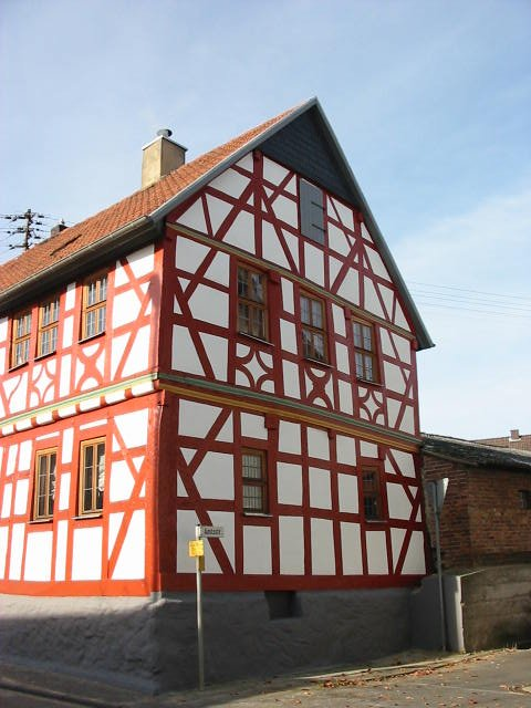 Aufnahme nach gelungener Sanierung 2009